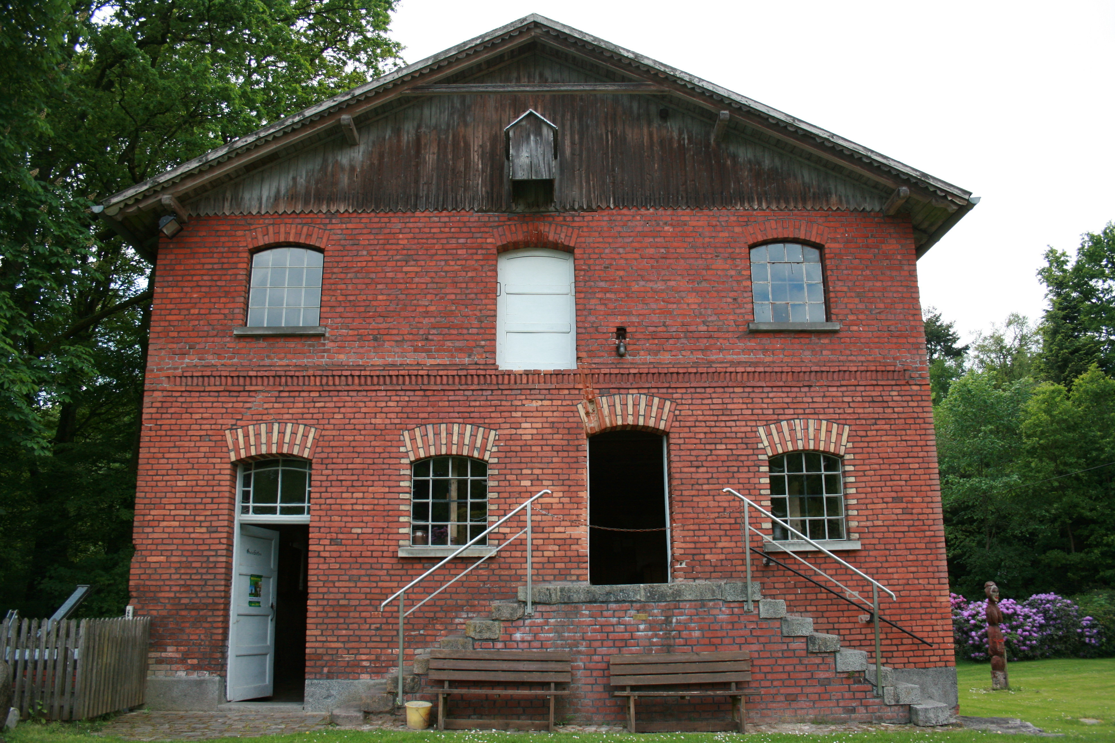 Wassermühle Eggersmühlen an der Fintau in Schneverdingen-Wesseloh/Eggersmühlen